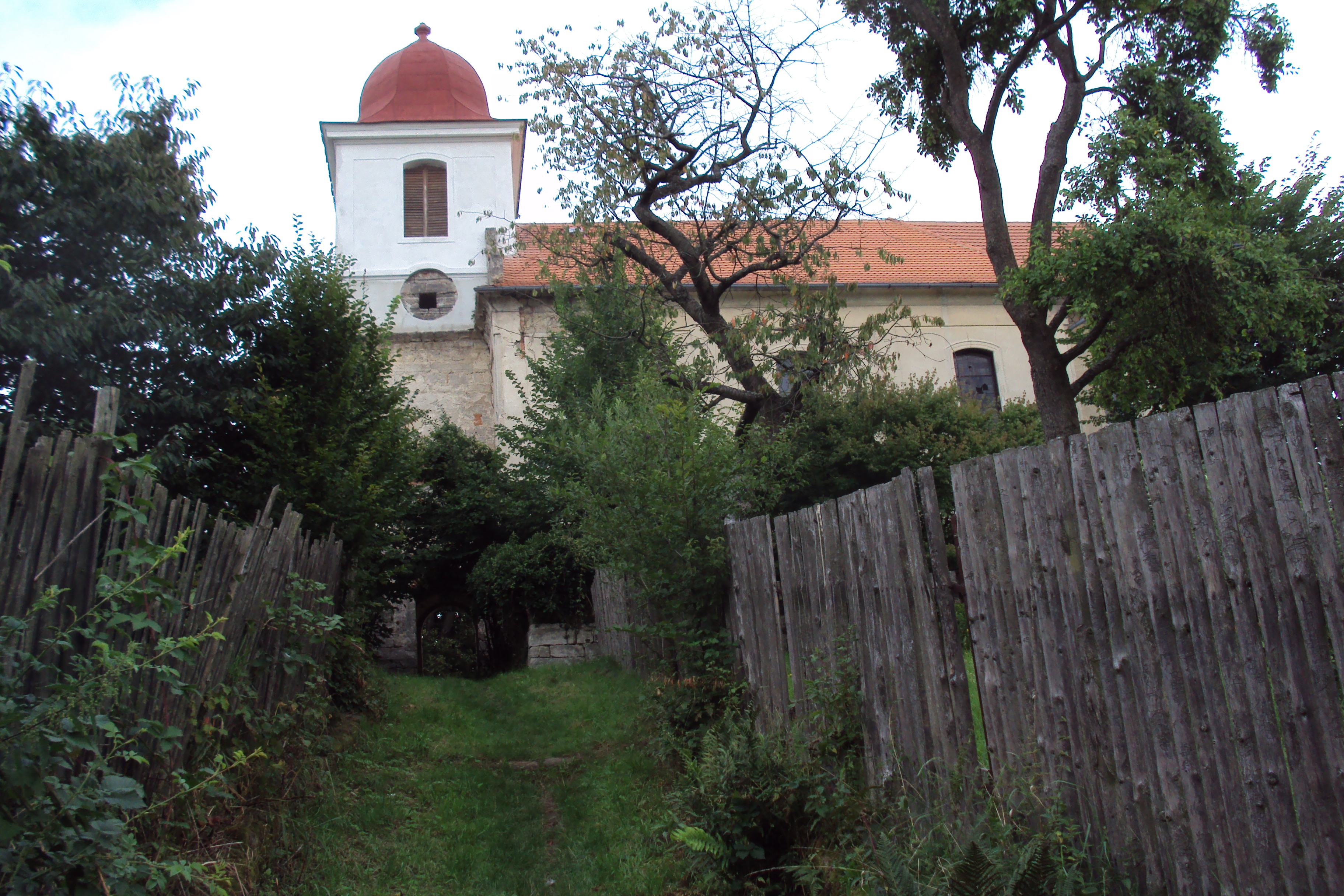 Kostel sv.Jakuba v Bořejově